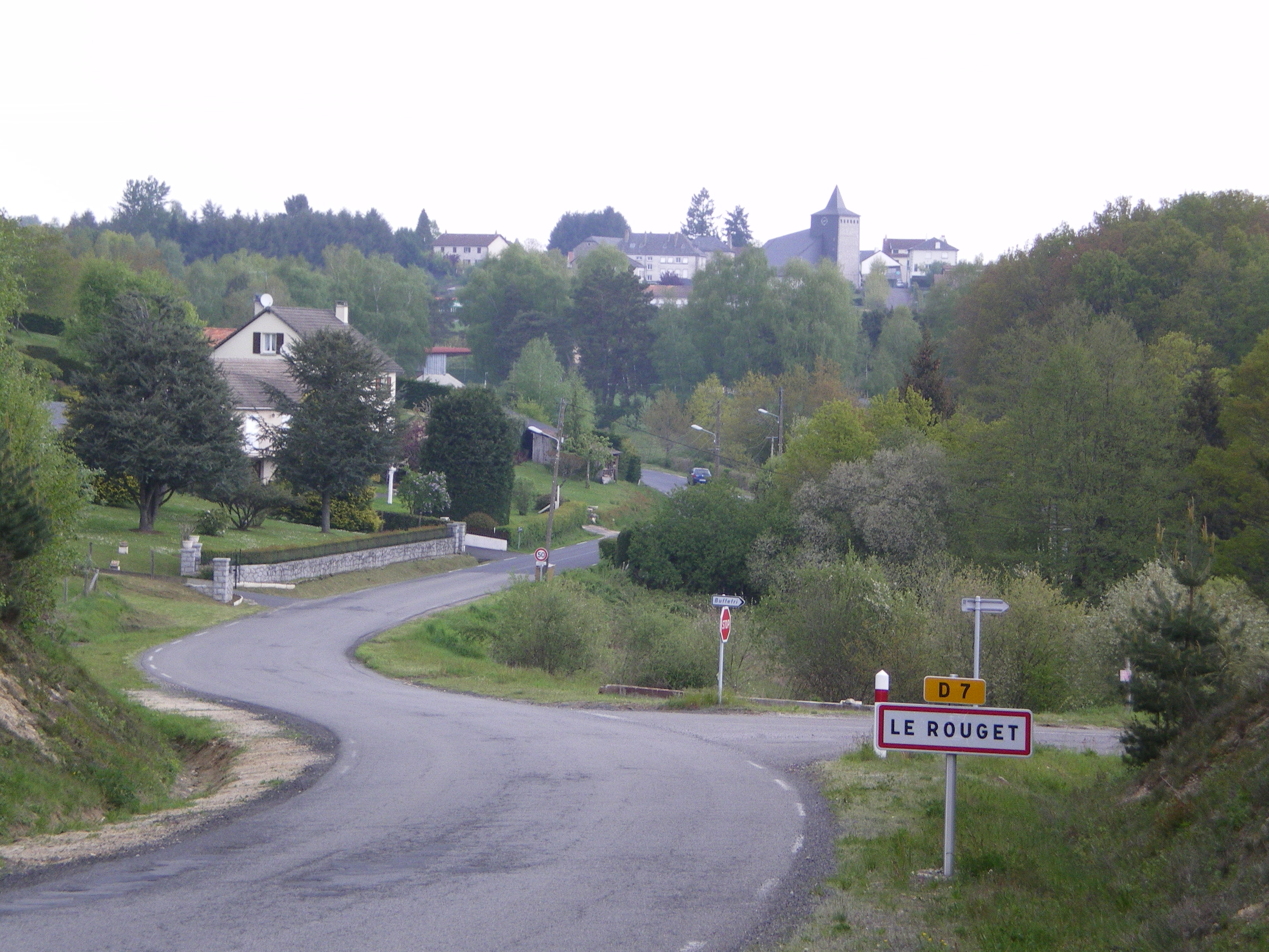 Le Rouget, Cantal, France